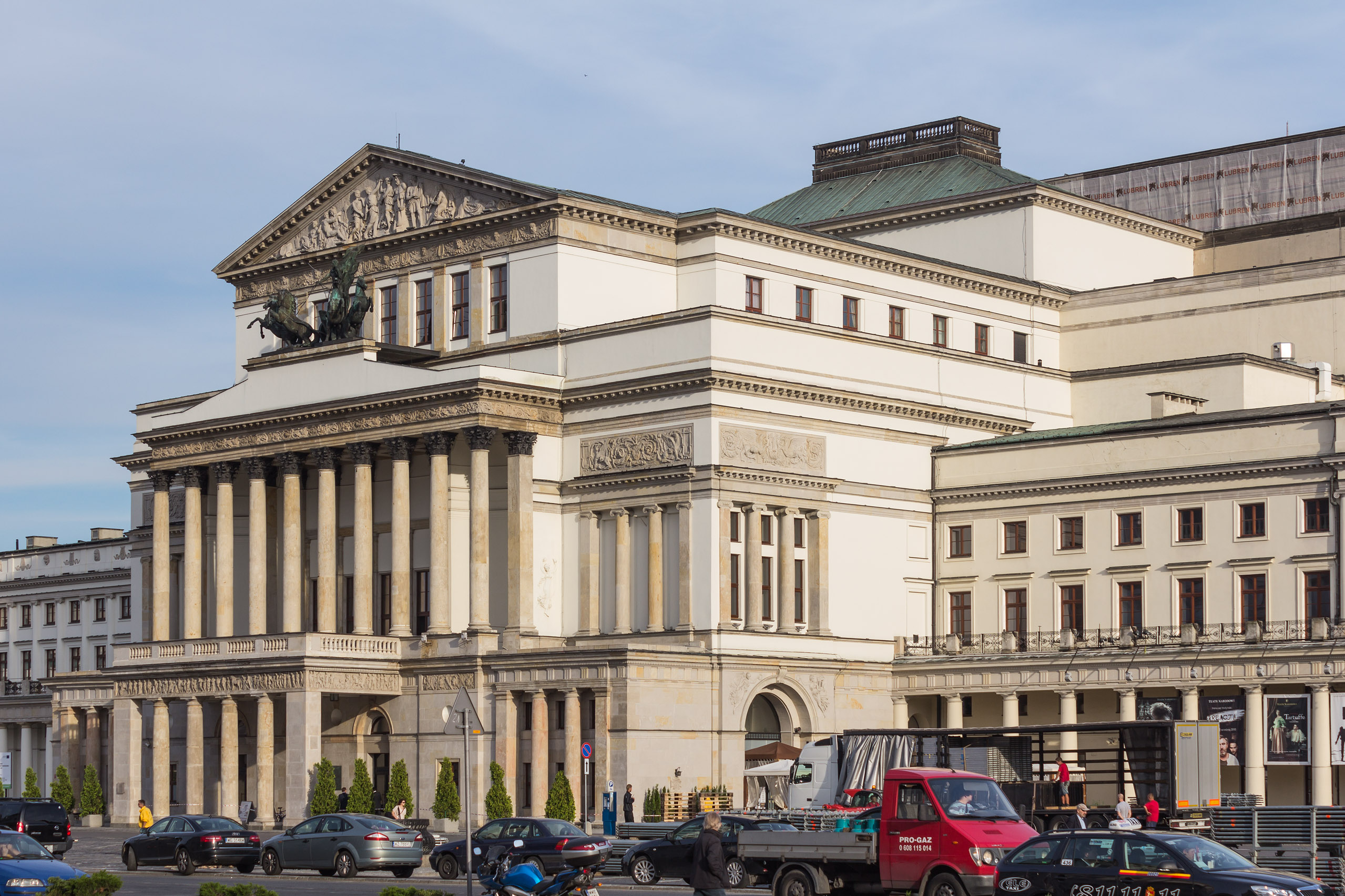 Budynek zlokalizowany przy placu Teatralnym w Warszawie, będący siedzibą Opery Narodowej. W Salach Redutowych mieści się Muzeum Teatralne oraz dwie spośród trzech scen Teatru Narodowego.